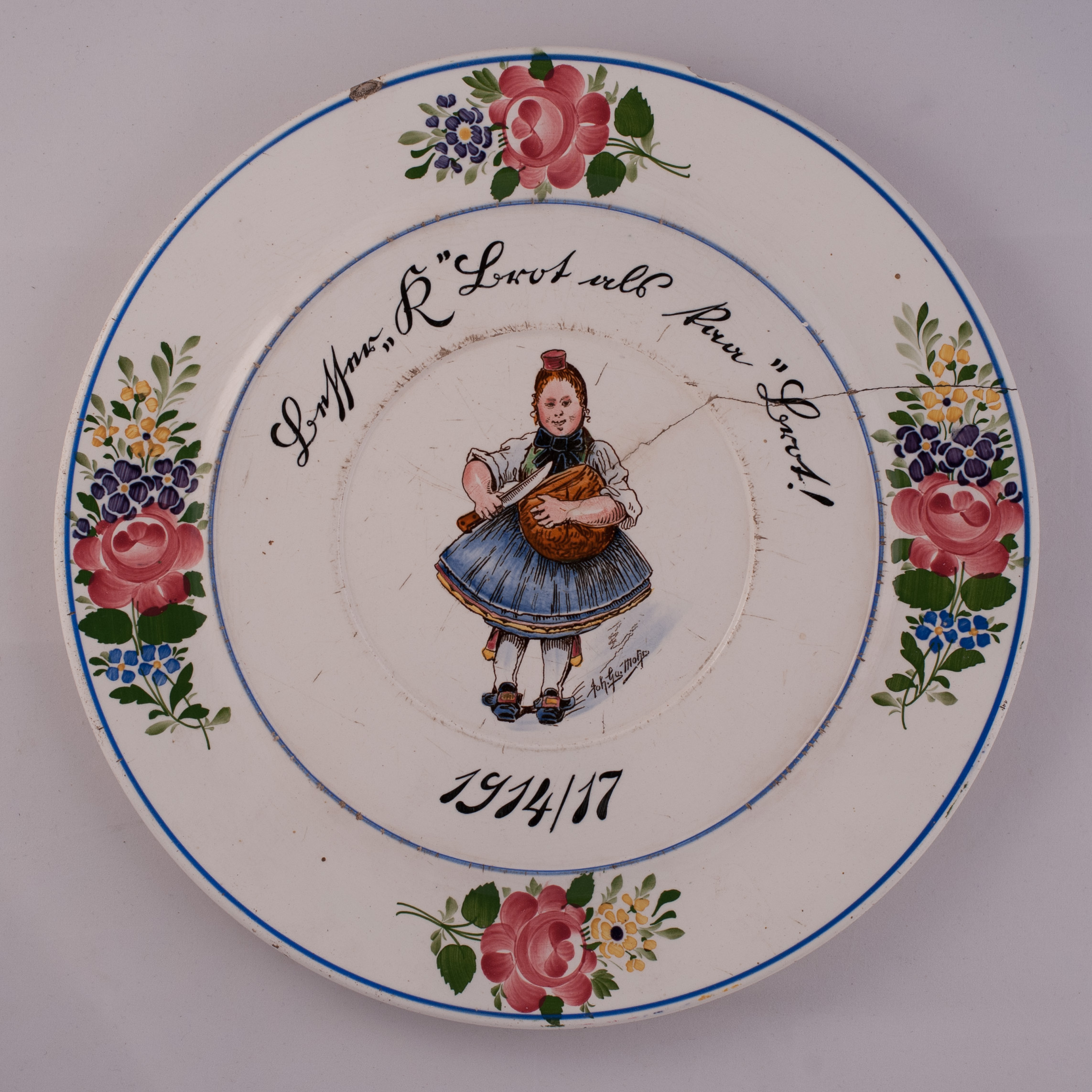 Majolikamuseum Bad Radkersburg, Teller, signiert Joh. Ga. Mohr, aus der Wächtersbach Steingutfabrik in Brachttal-Schlierbach (Hessen) zeigt ein Mädchen in der Tracht der Schwälmerinnen, die in einem Teil Nordhessens (heute Schwalm-Eder-Kreis) getragen wurde. Das sog. K-Brot (Kartoffel-, Kommiss oder Kriegsbrot) wurde zum Inbegriff der schlechten Versorgungslage im Ersten Weltkrieg. Aus Mangel an Getreide wurde auch Mehl aus Kartoffeln, Kastanien, Eicheln und anderen Ersatzstoffen verbacken.